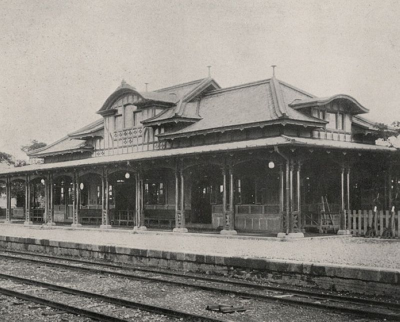 日本時代的桃園車站